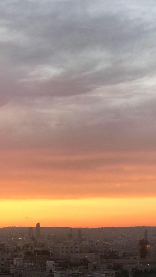 صورة جوية طولية لسماء منطقة القويسمة في العاصمة عمان في فترة غروب الشمس